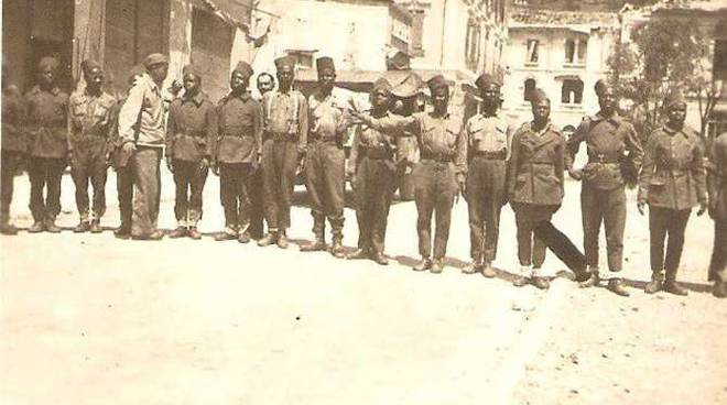 Truppe coloniali francesi durante l'occupazione francese di Vantimiglia tra il 25 aprile e il 18 luglio 1945